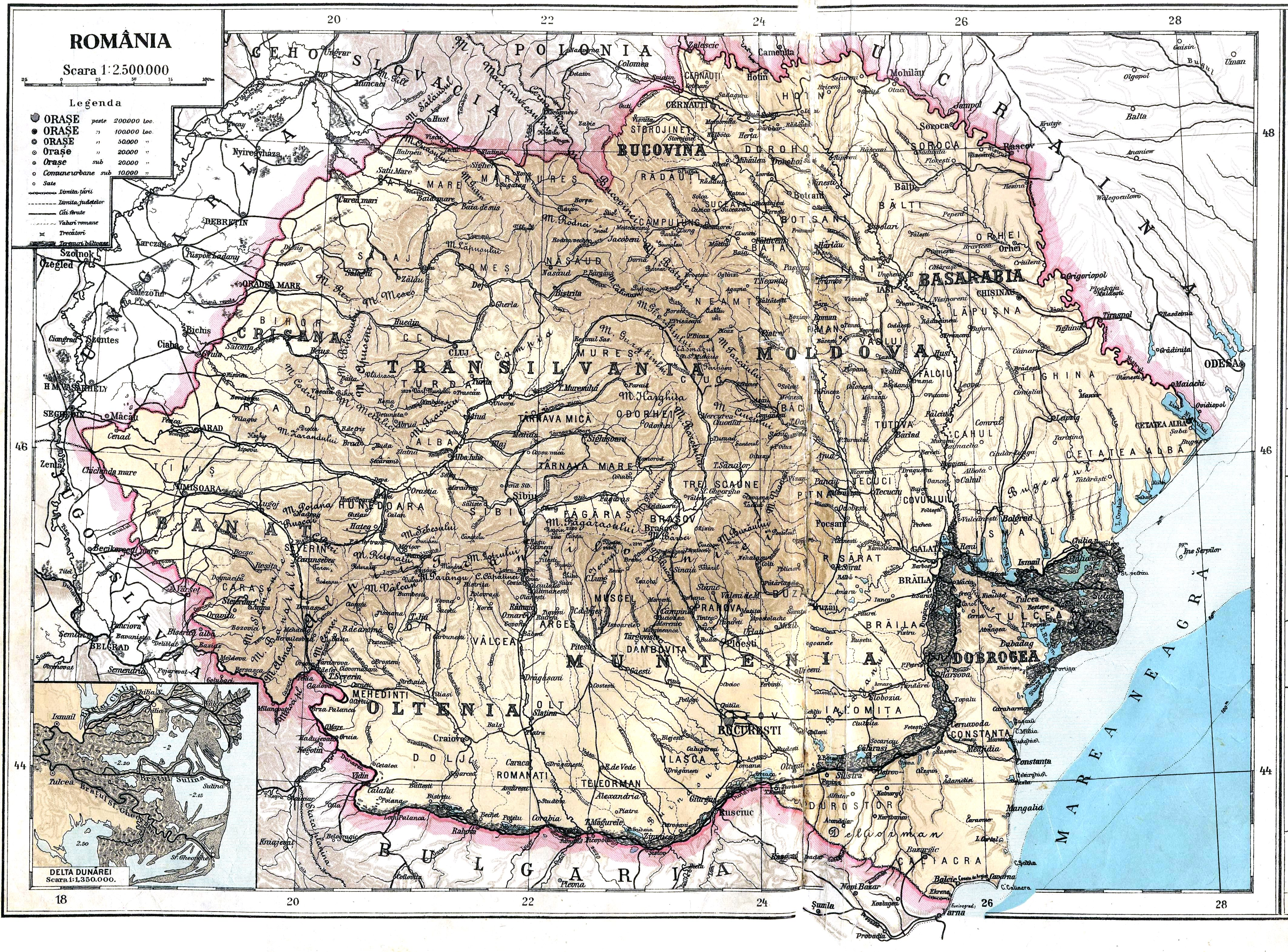 Greater Romania, administrative map.